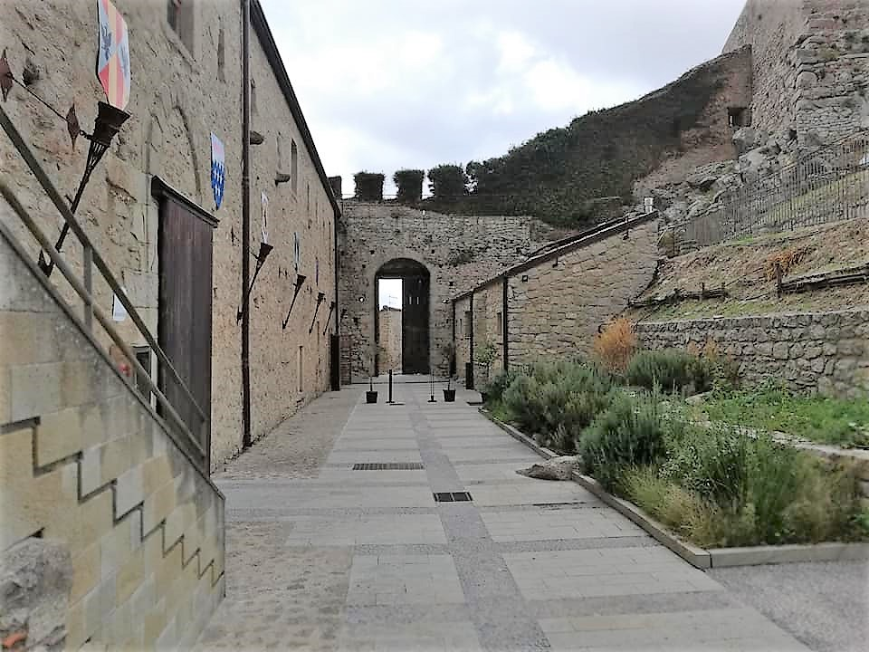 Cortile, ala ovest e ingresso settentrionale.